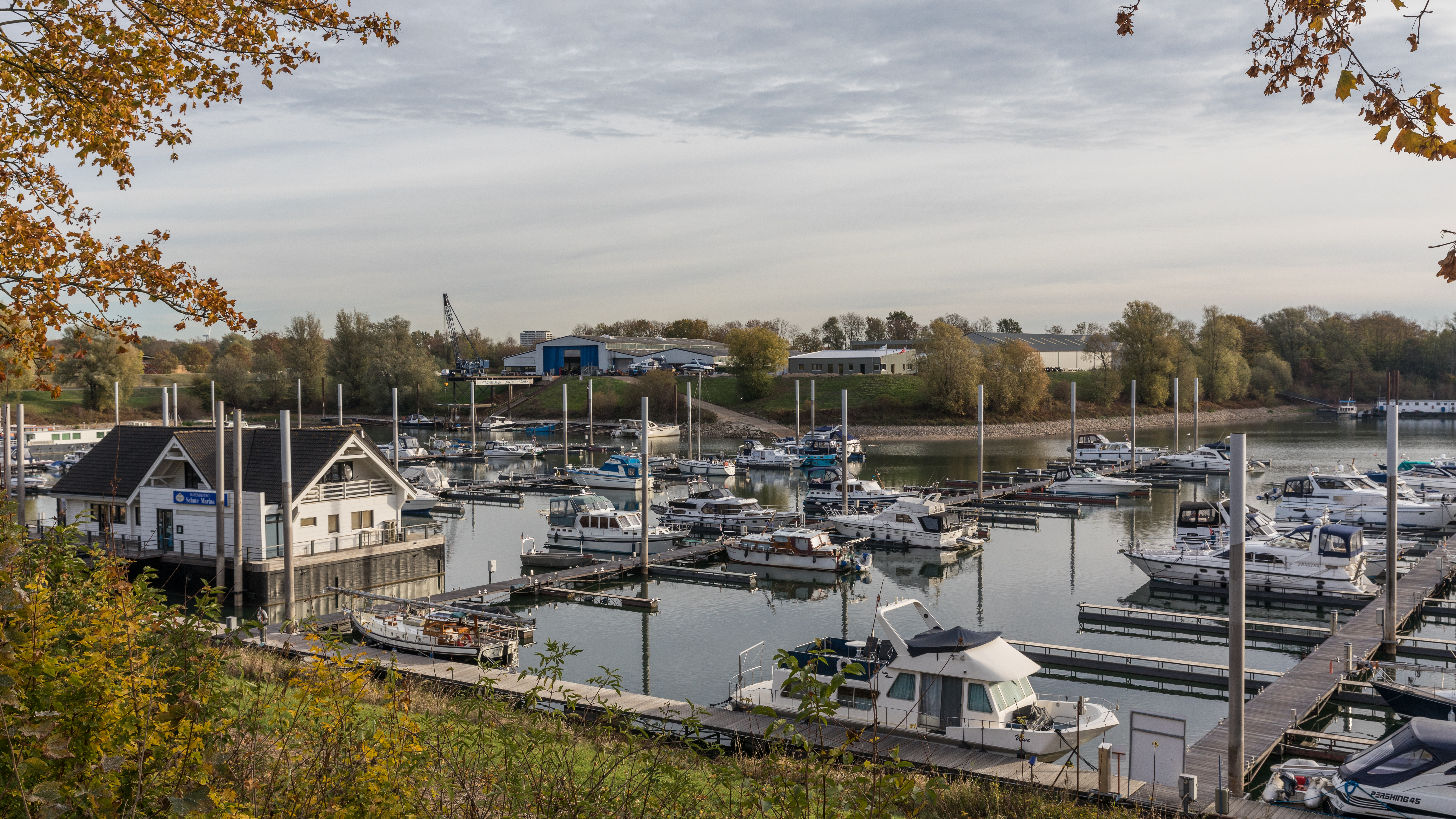 Yachthafen Emmerich am Rhein